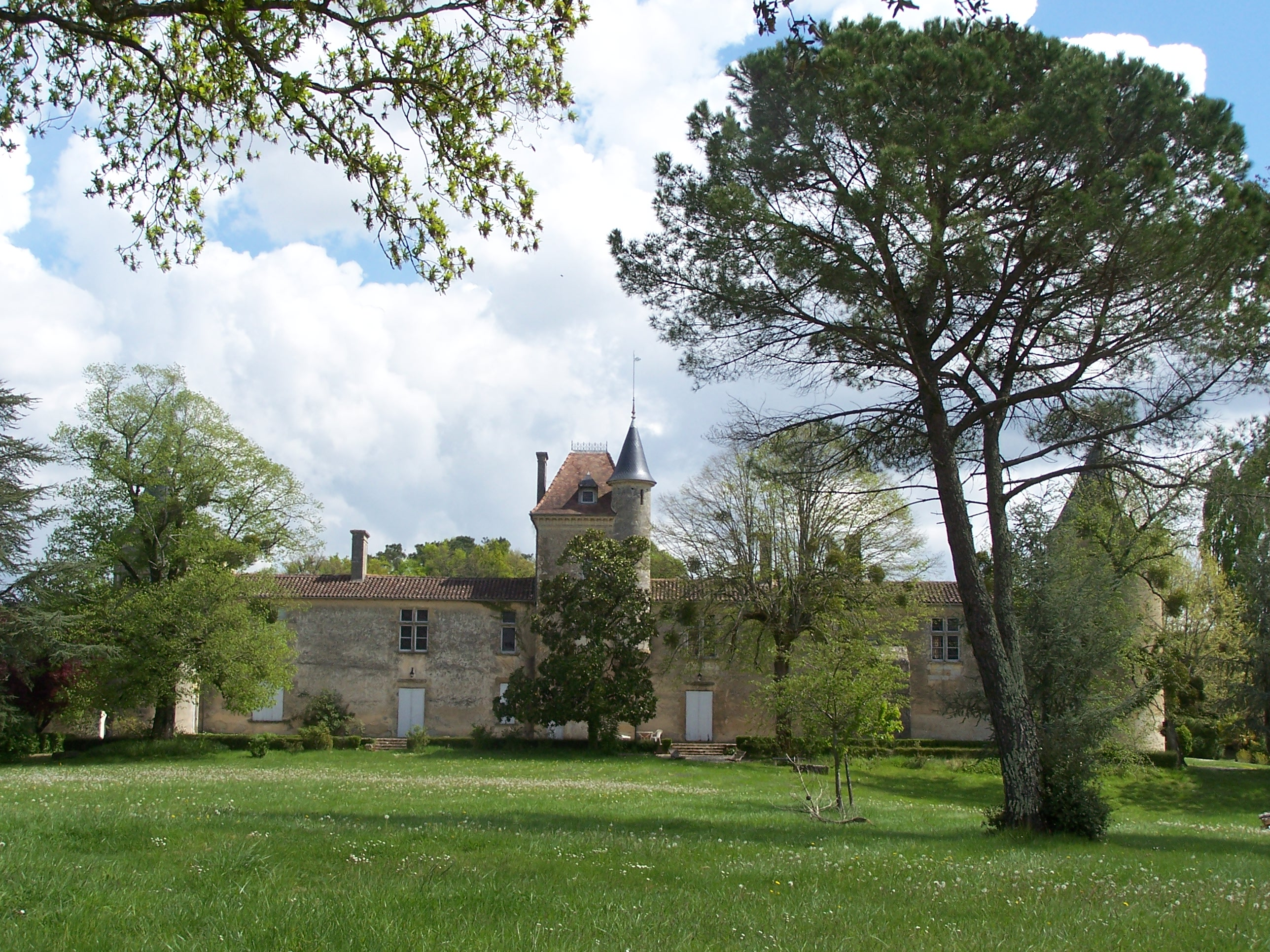 Château Malromé à Saint-André-du-Bois, Gironde, France